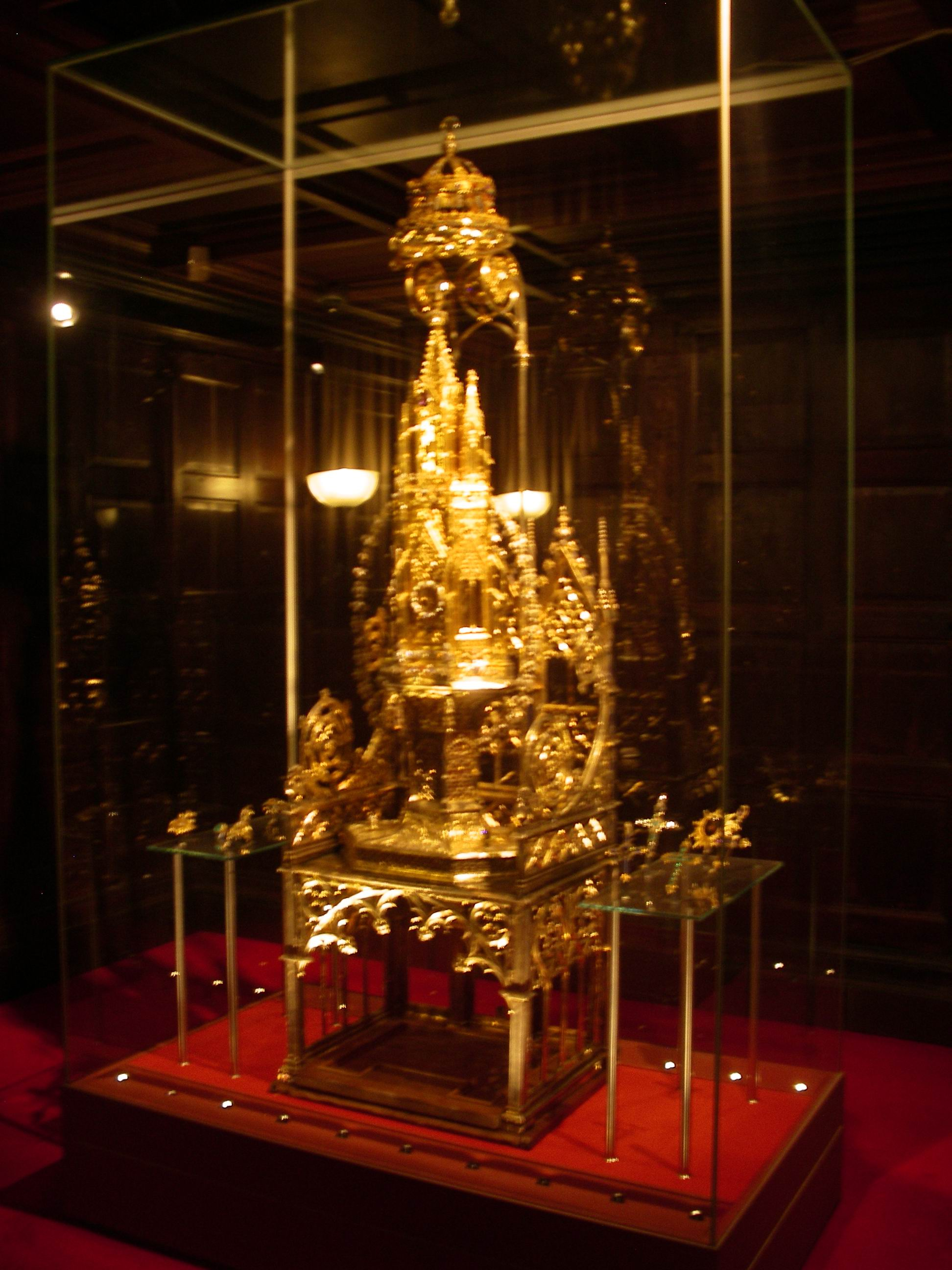 Cadira del Rei Martí i custòdia de la Catedral de Barcelona, s. XIV-XV